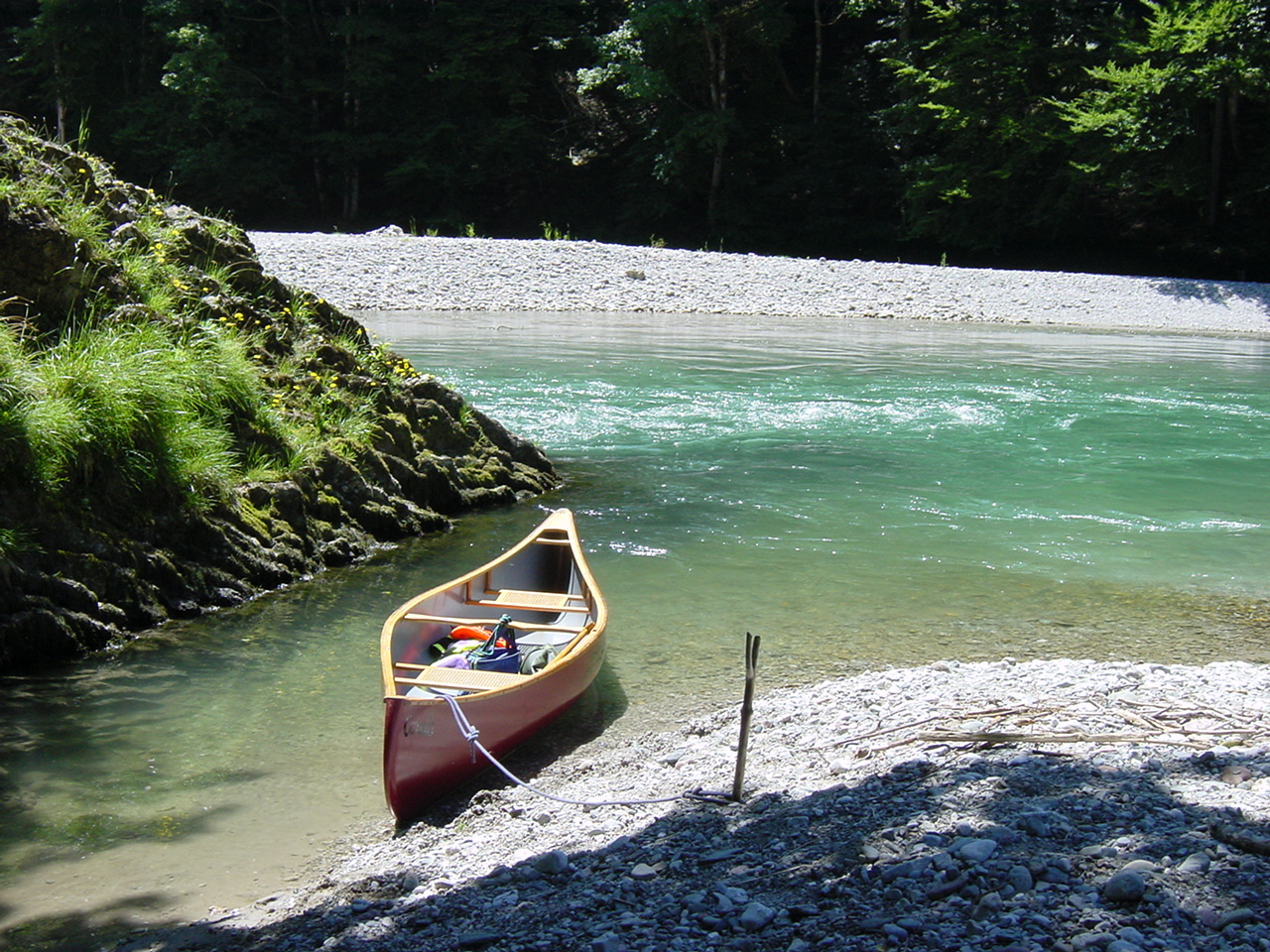 Tiroler Ache in der Entenlochklamm selbst fotografiert, Fotograf: interpixel.de